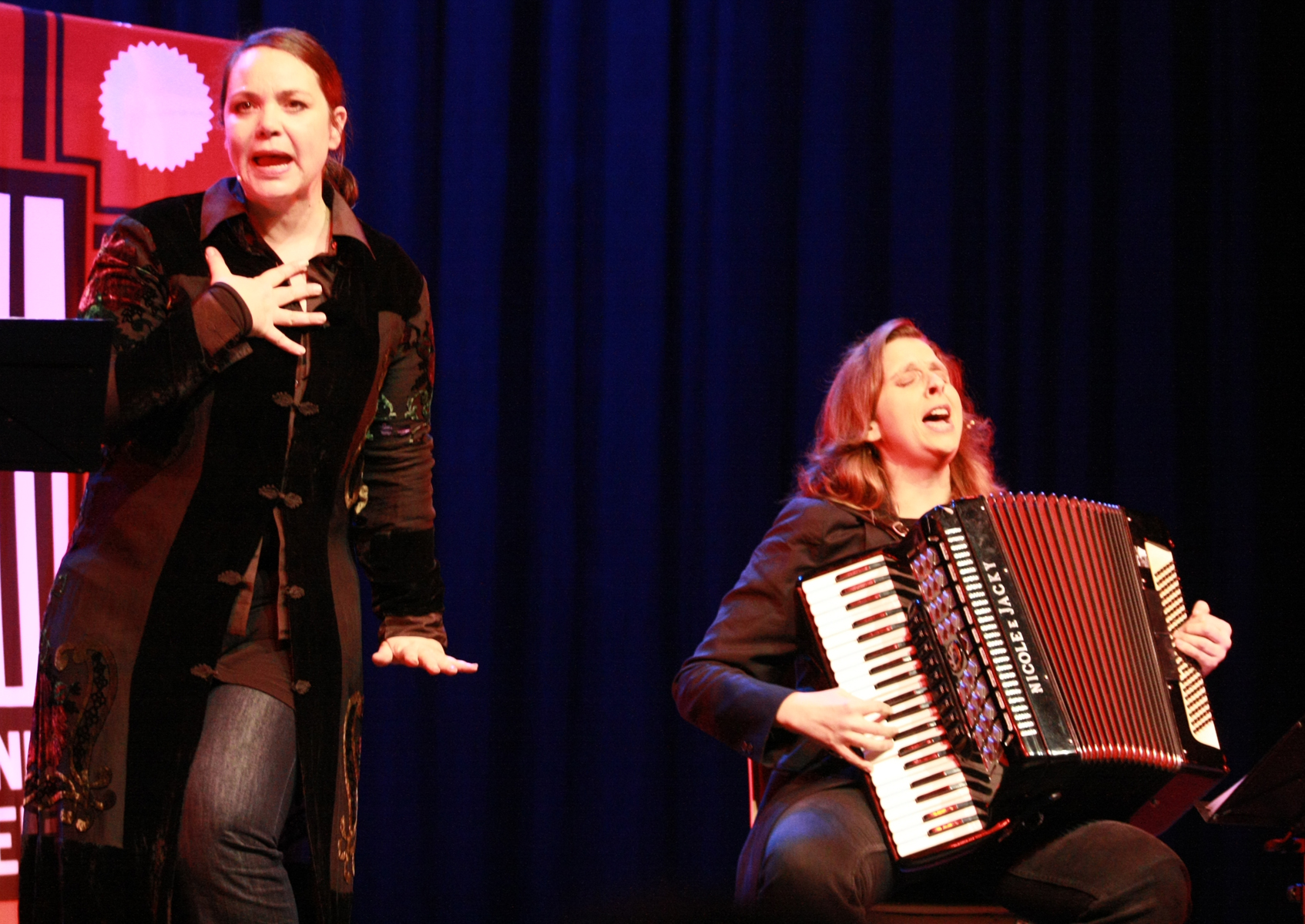 Das Schweizer Kabarett-Duo Knuth und Tucek während eines Auftritts auf der Freiburger Kulturbörse 2012.